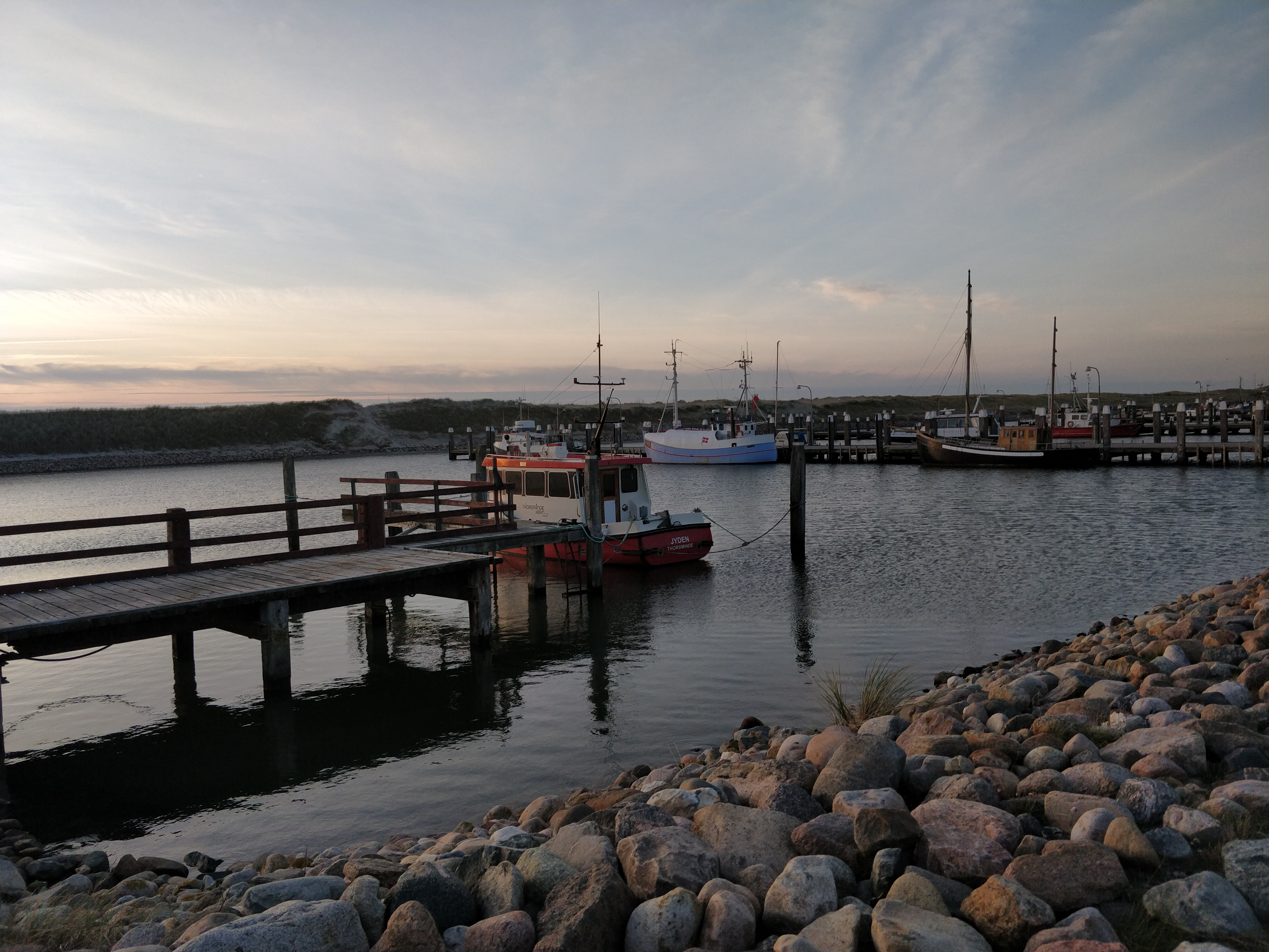 Thorsminde Havn